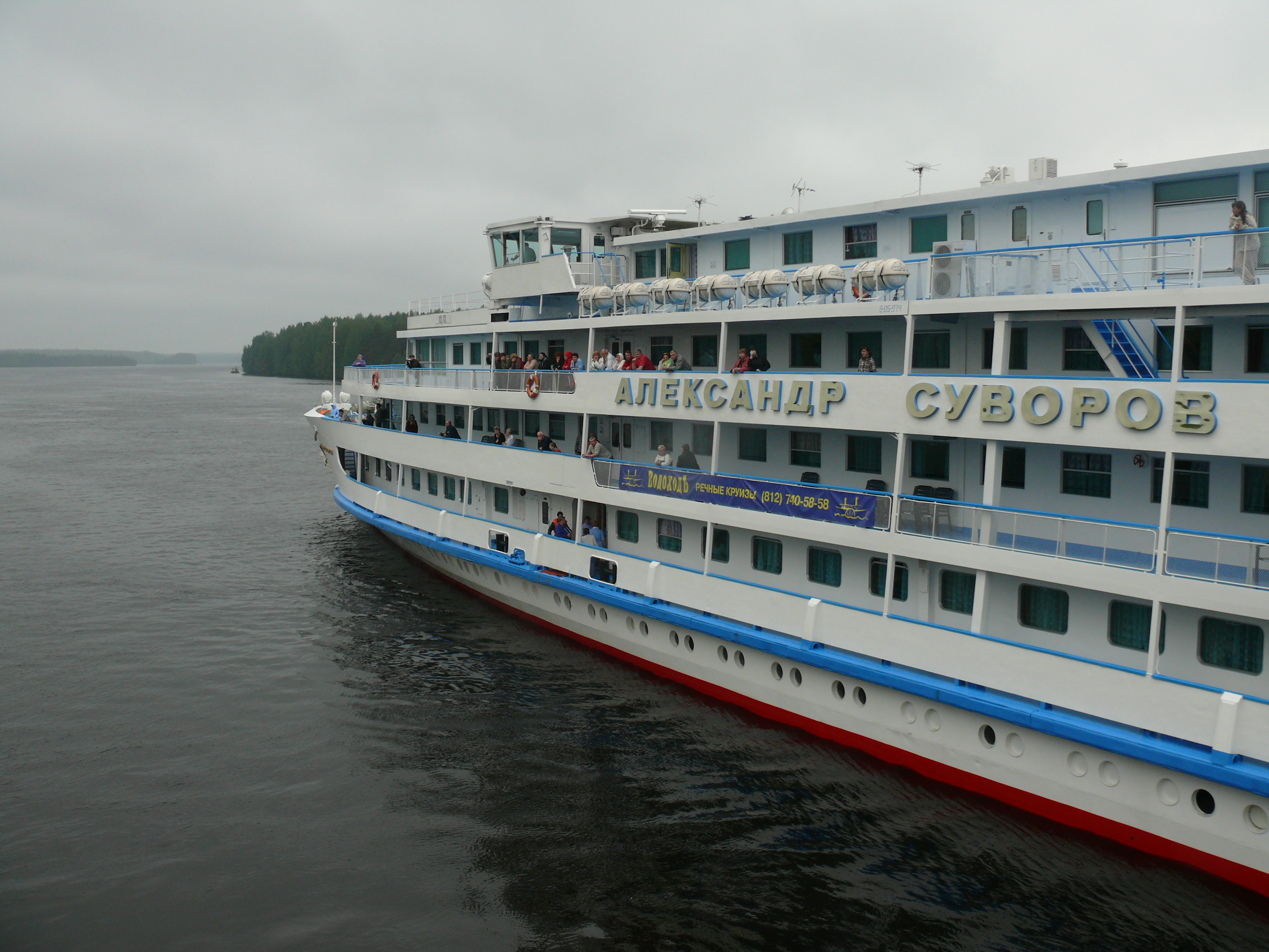 Теплоход проекта 92-016 "Александр Суворов"